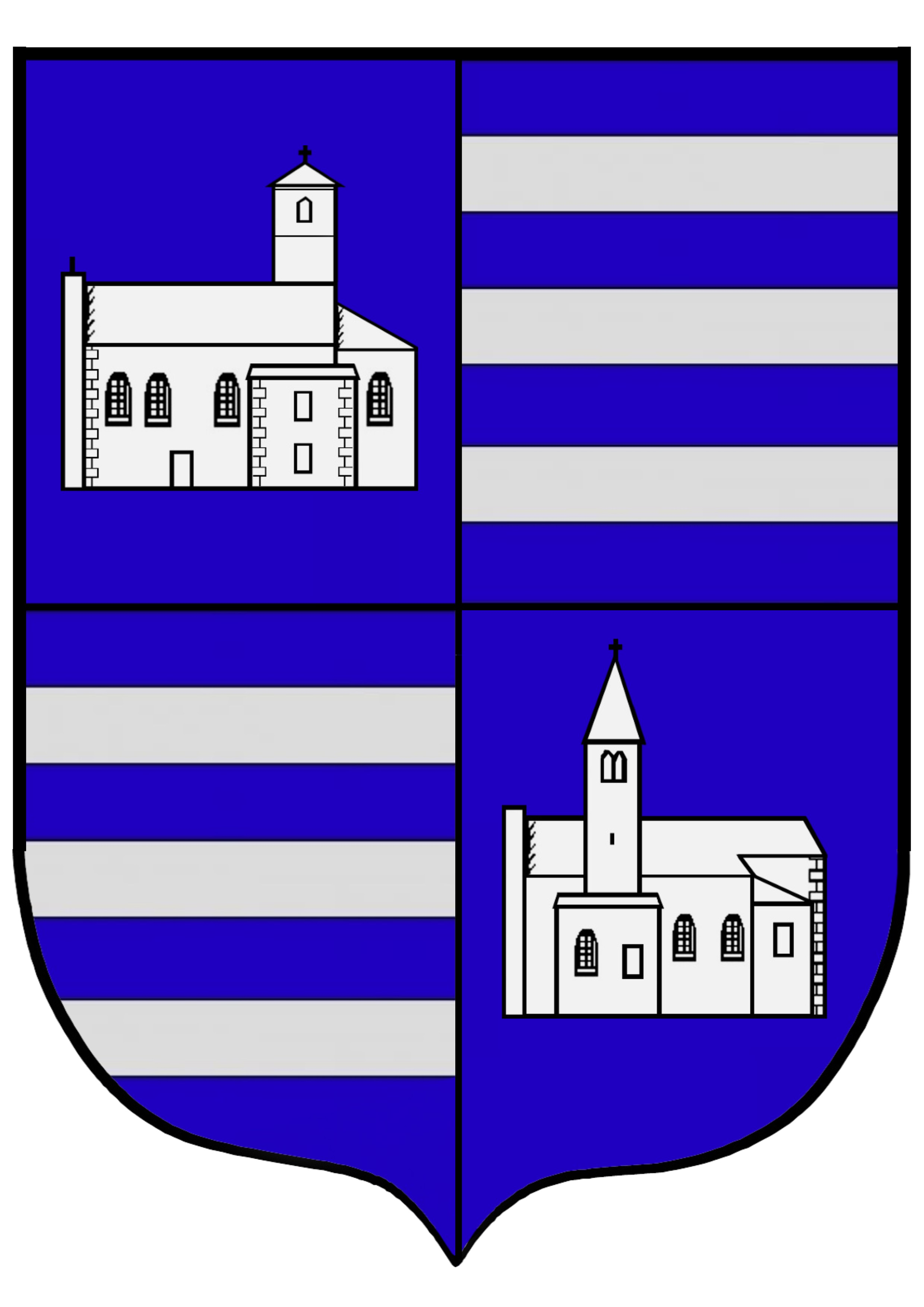 blason du petit village de la chapelle de mardore symbolisant les deux clochers à l'origine (avant 1100). le clocher de mardore et ce lui de la chapelle de mardore.